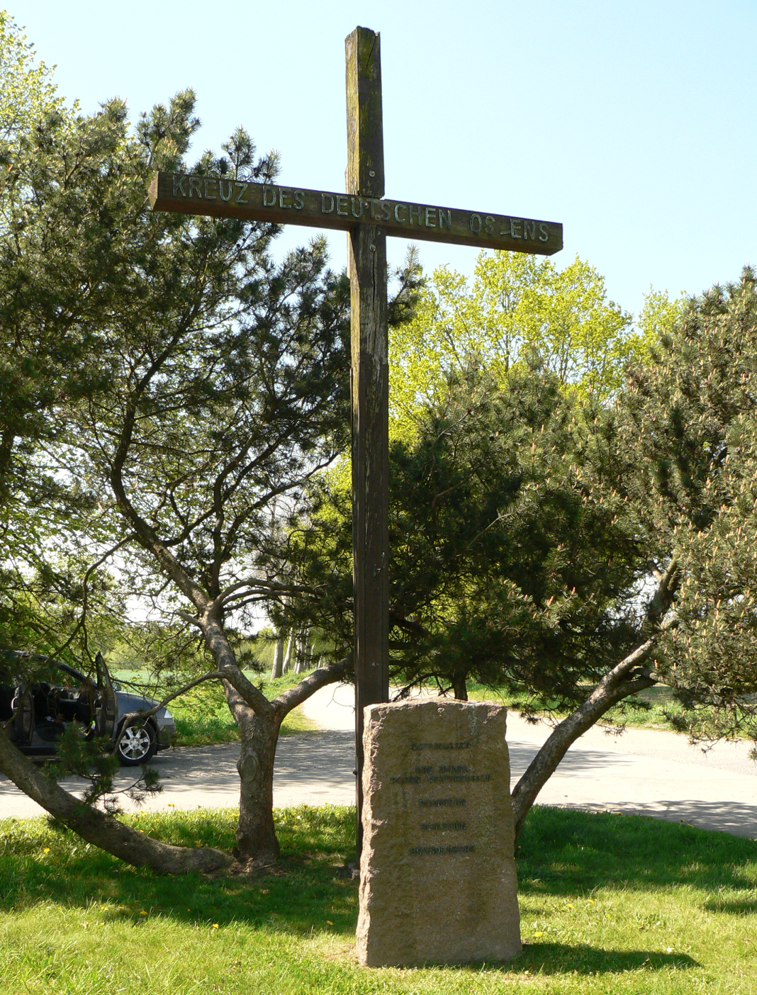 Vertriebenendenkmal als Ostlandkreuz und Gedenkstein in Mellendorf